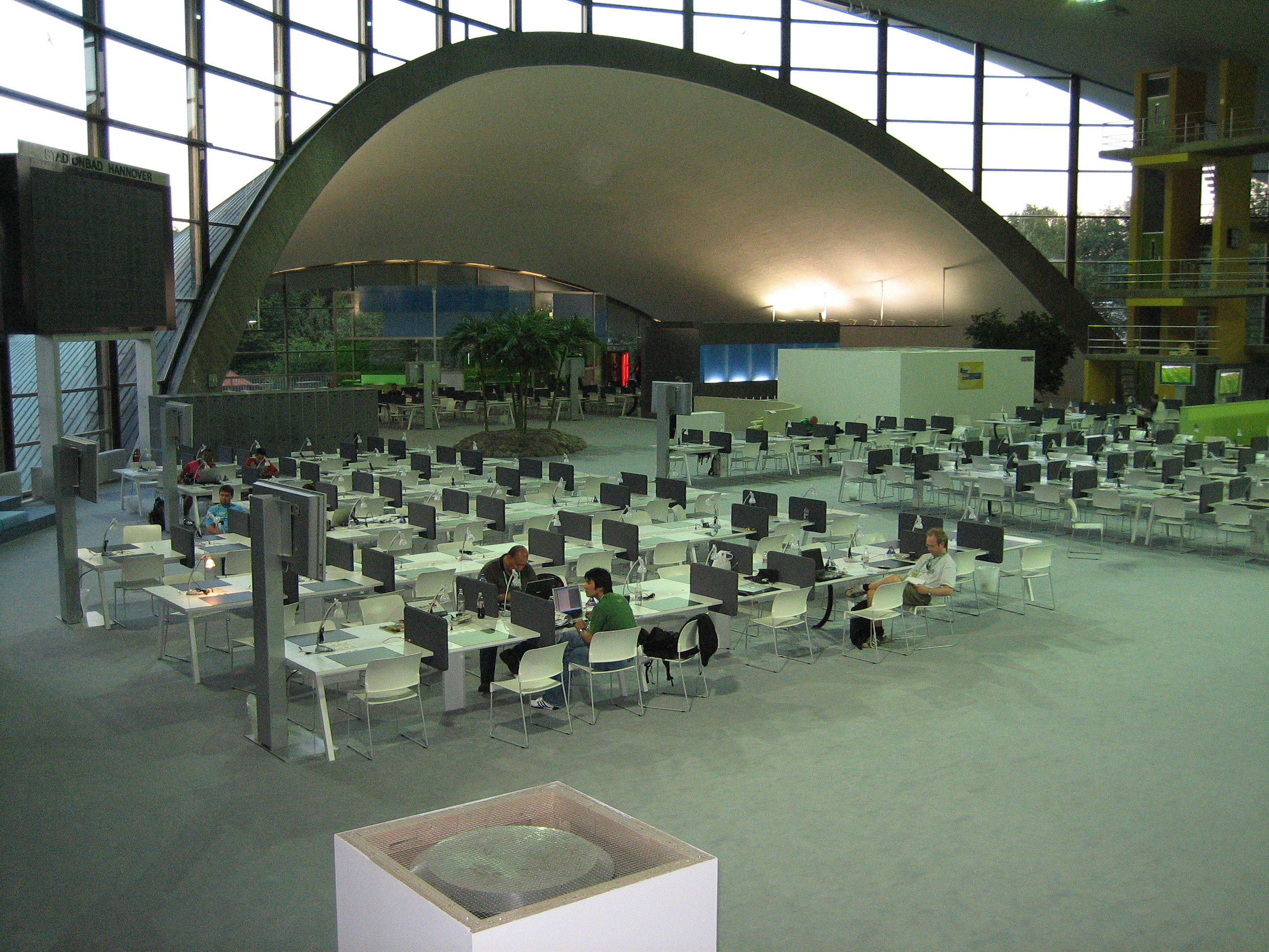 Das Stadionbad während der FIFA WM 2006, temporär umgebaut als Pressezentrum.